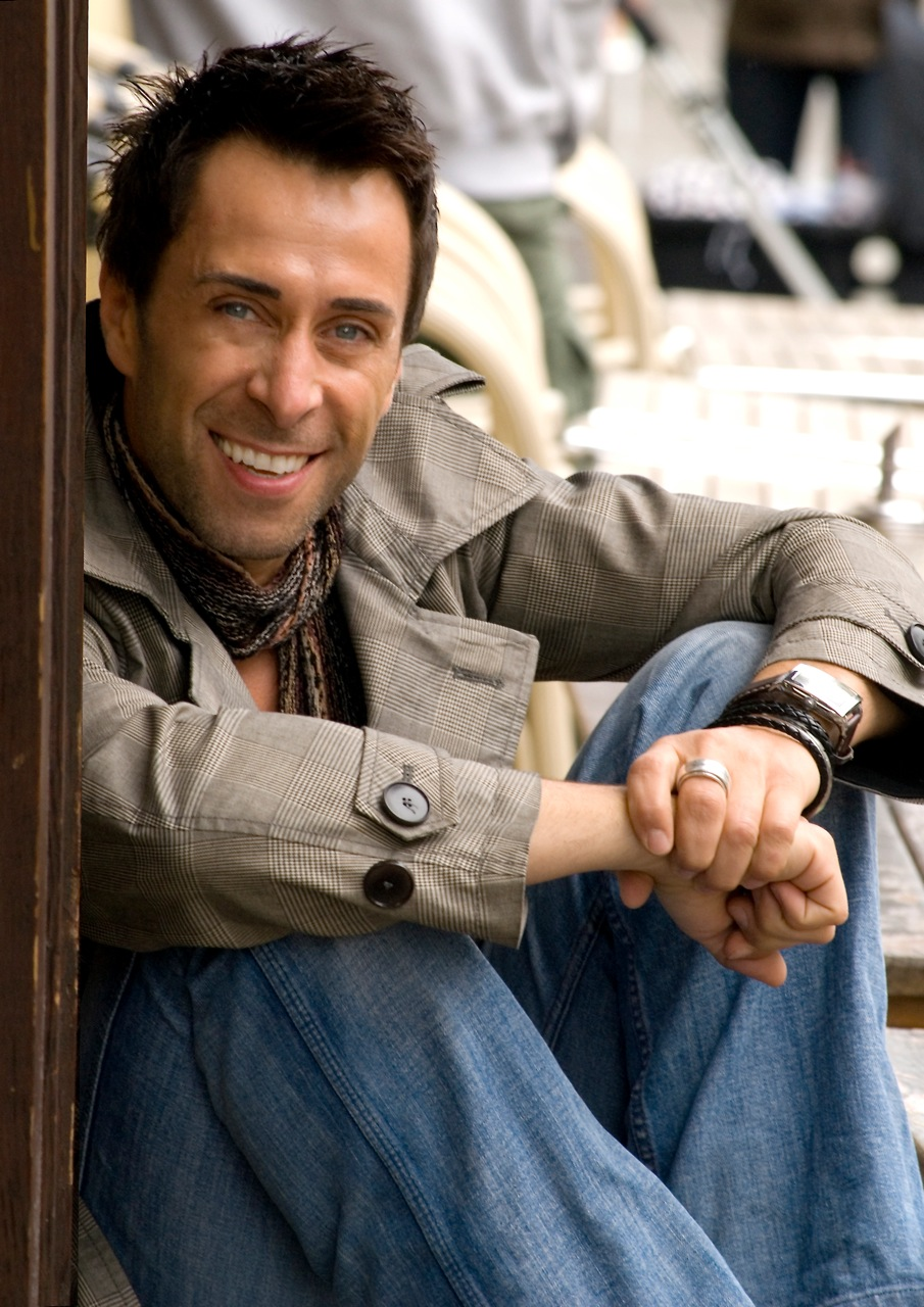 Adrian Becker privat